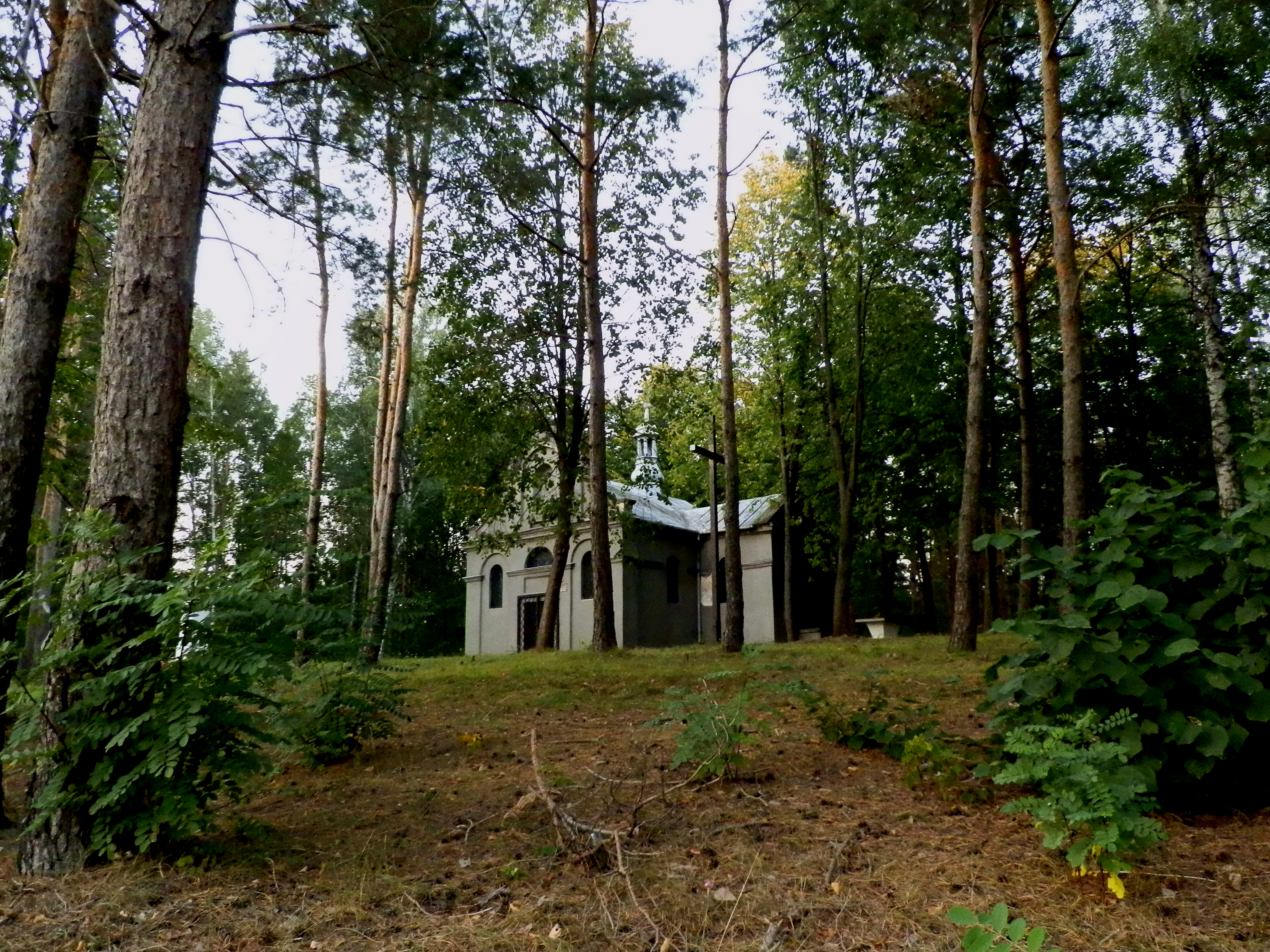 Kaplica p.w. św. Rocha w Wąchocku. 834 z 19.01.1973.